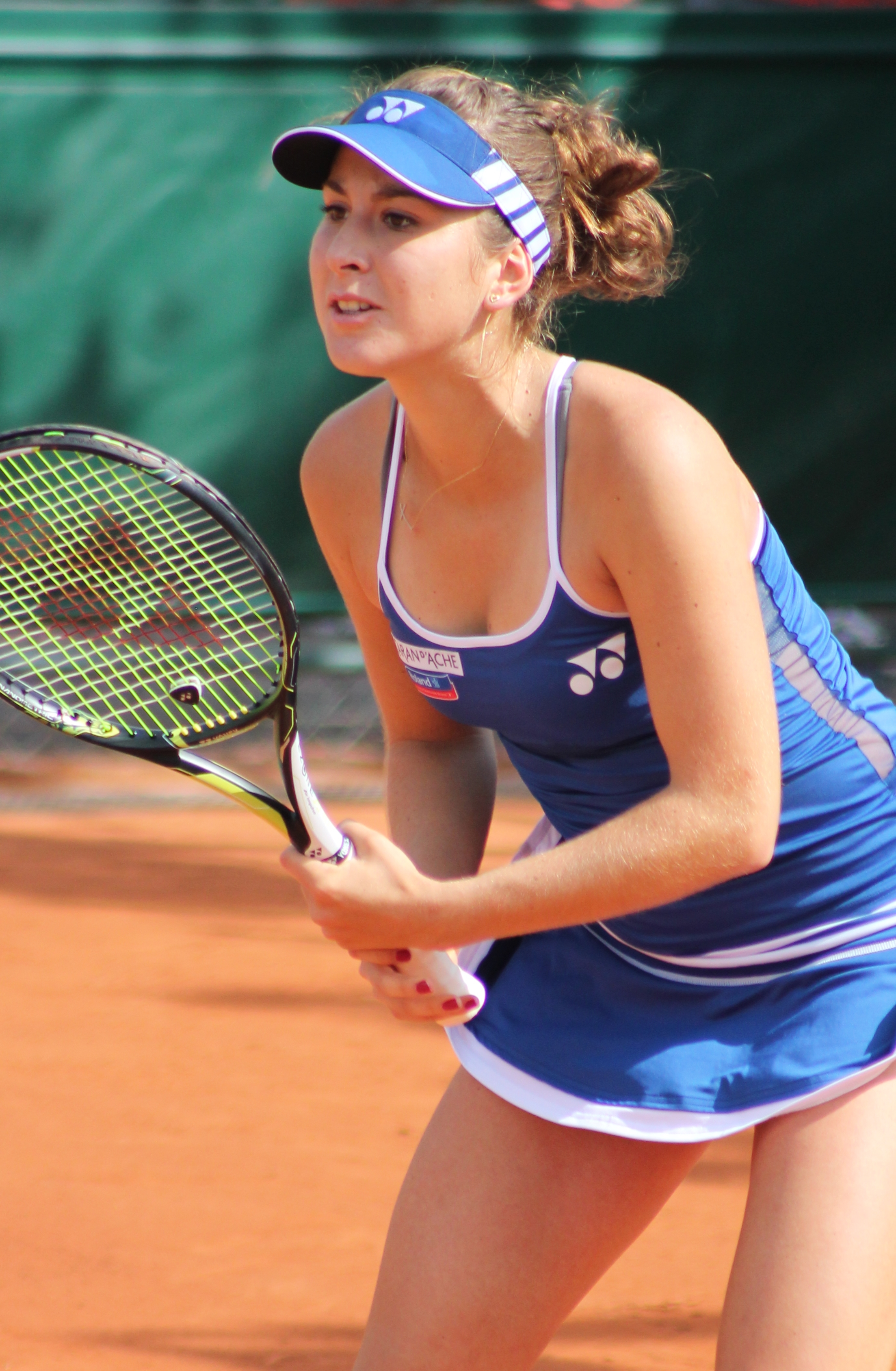 Bencic RG15 (21)